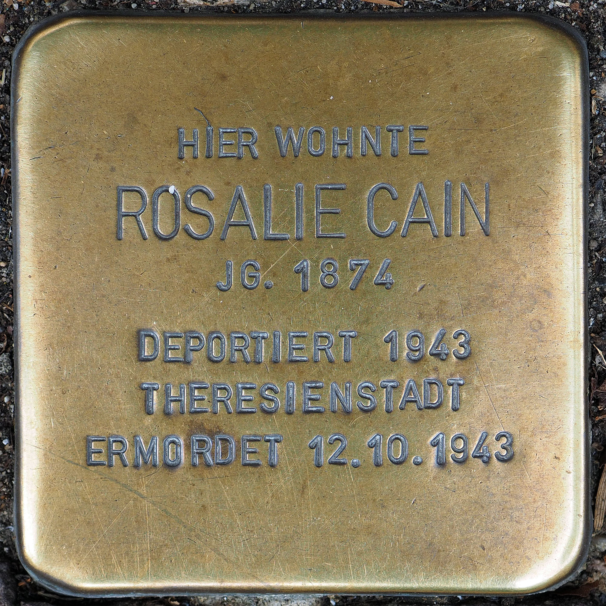 Stolperstein Geldern Issumer Straße 53 Rosalie Cain